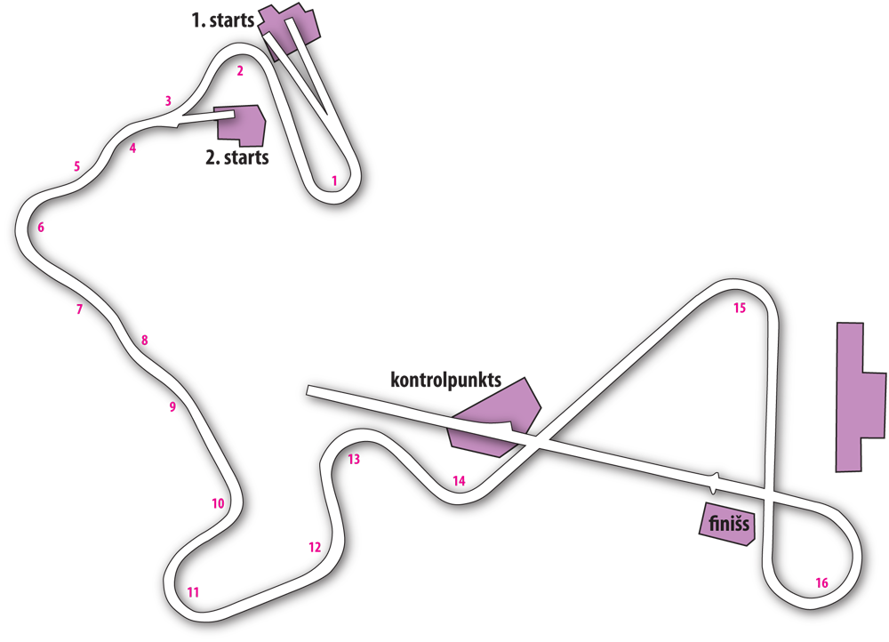 Siguldas kamaniņu trases shēma. Zīmējis A.Buks